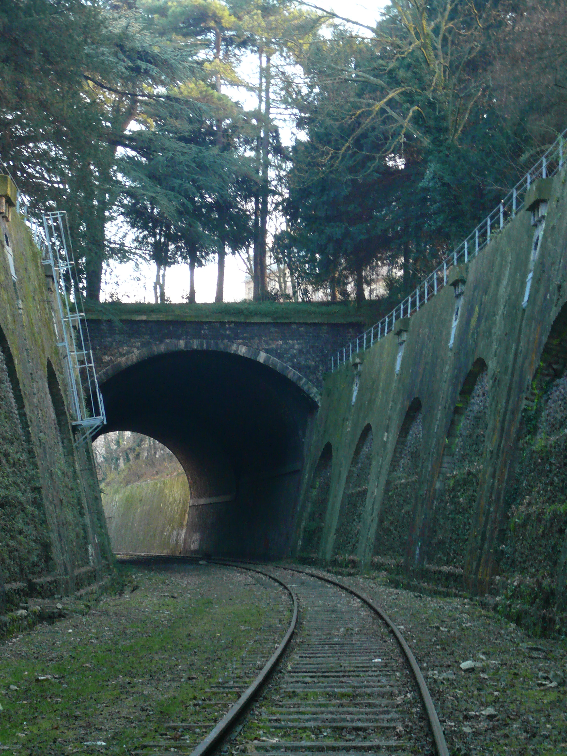 La Petite Ceinture traverse le parc Montsouris, XIVème Arrondissement.